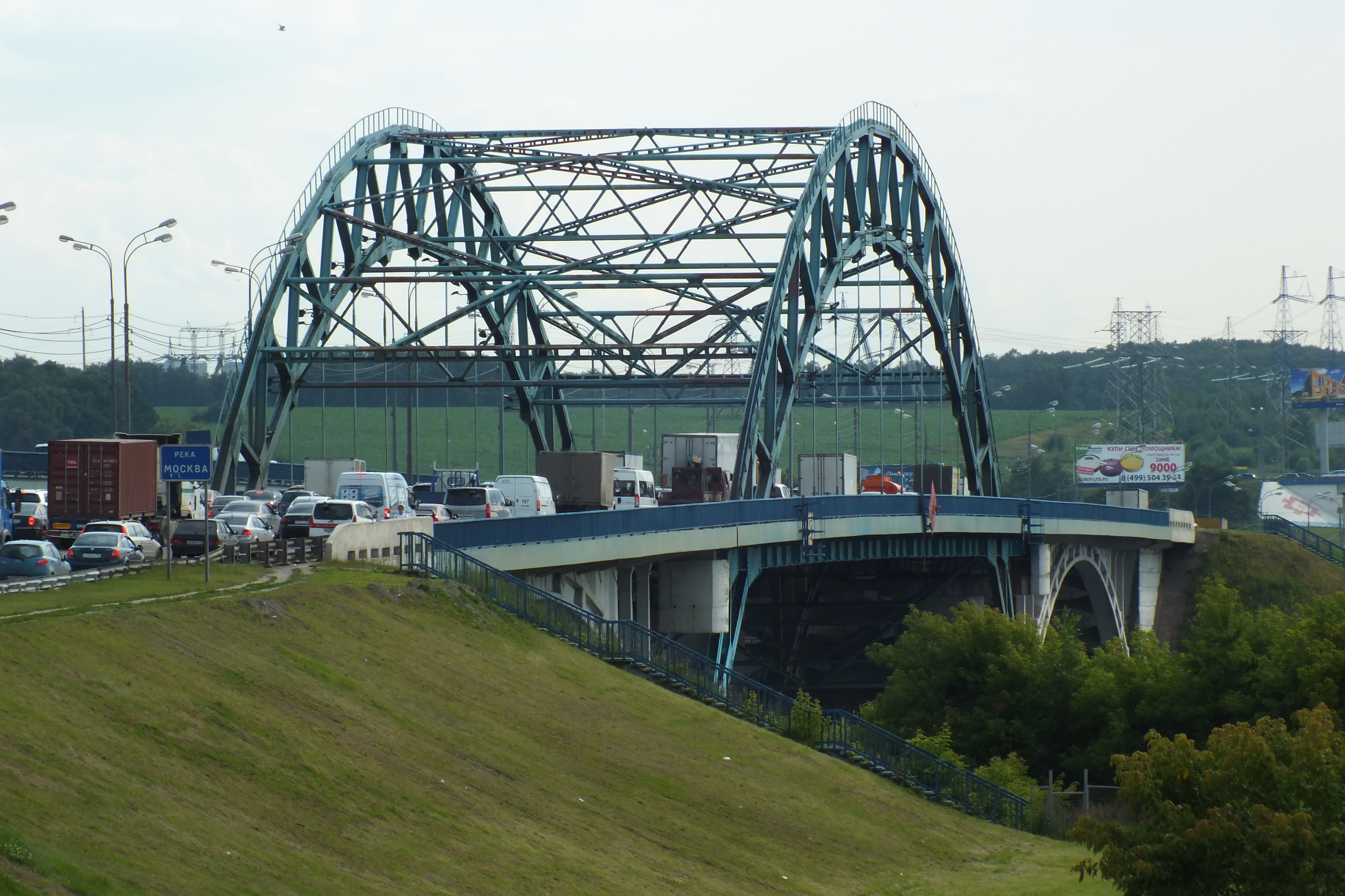 Бесединские мосты, съёмка с капотнинского берега, 3 июля 2014 года